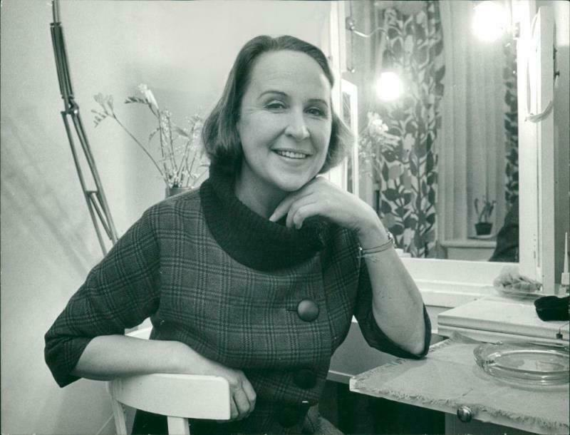 Birgitta Valberg (1916–2014).